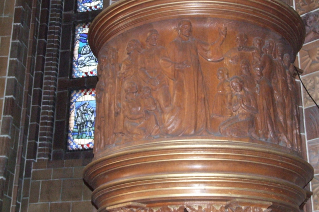 Martin-Luther-Gedächtniskirche Berlin-Mariendorf, Kanzel mit Soldat Fotograf: Harald Rossa Datum: September 2006 Höher aufgelöste Version ist verfügbar